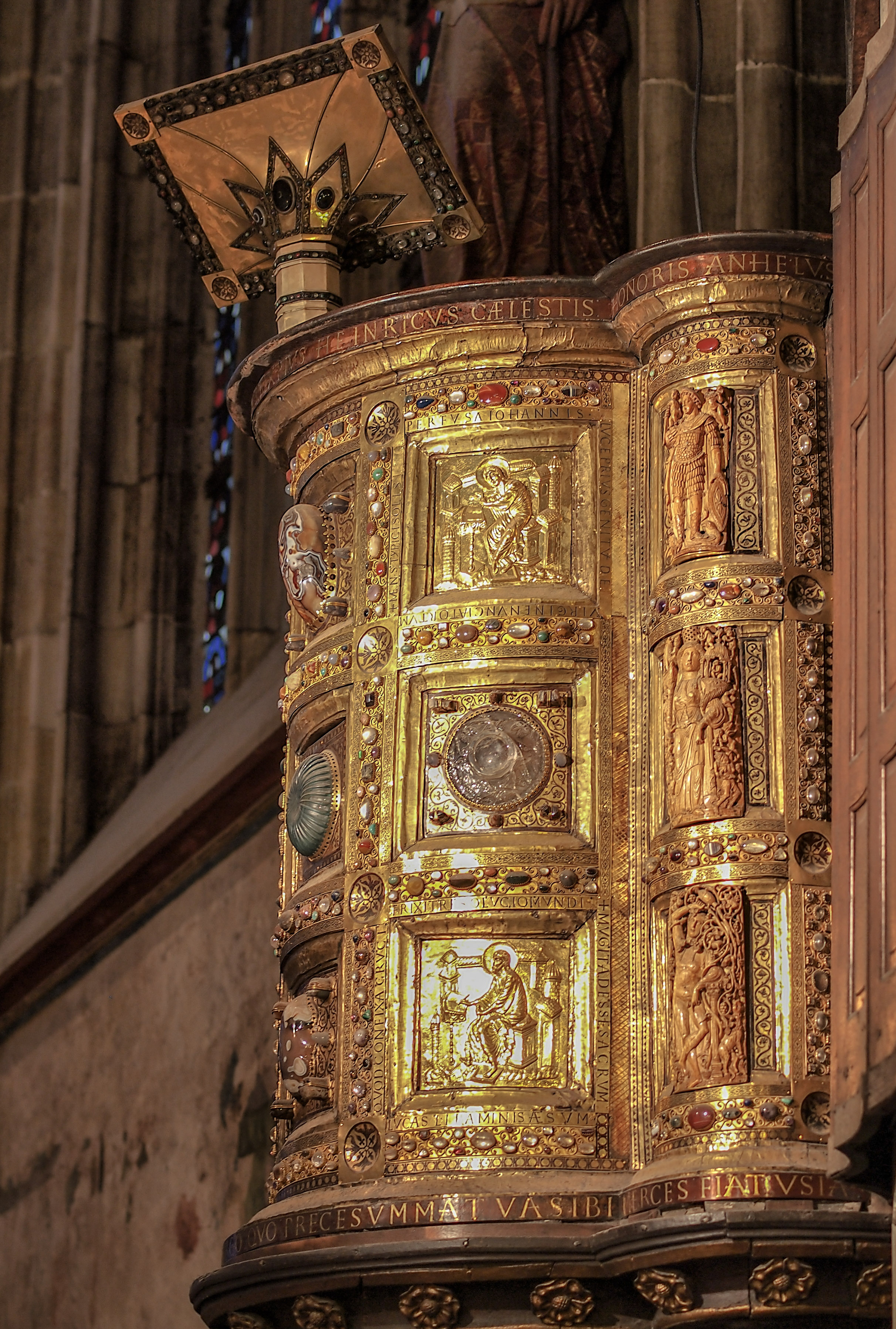 Heinrichskanzel im Dom in Aachen, Denkmal